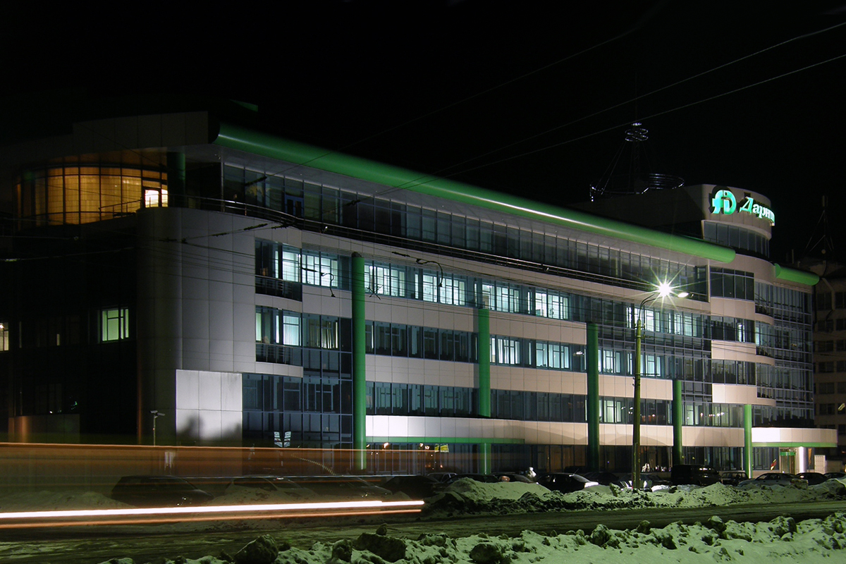 Фармацевтическая фабрика «Дарница», Киев